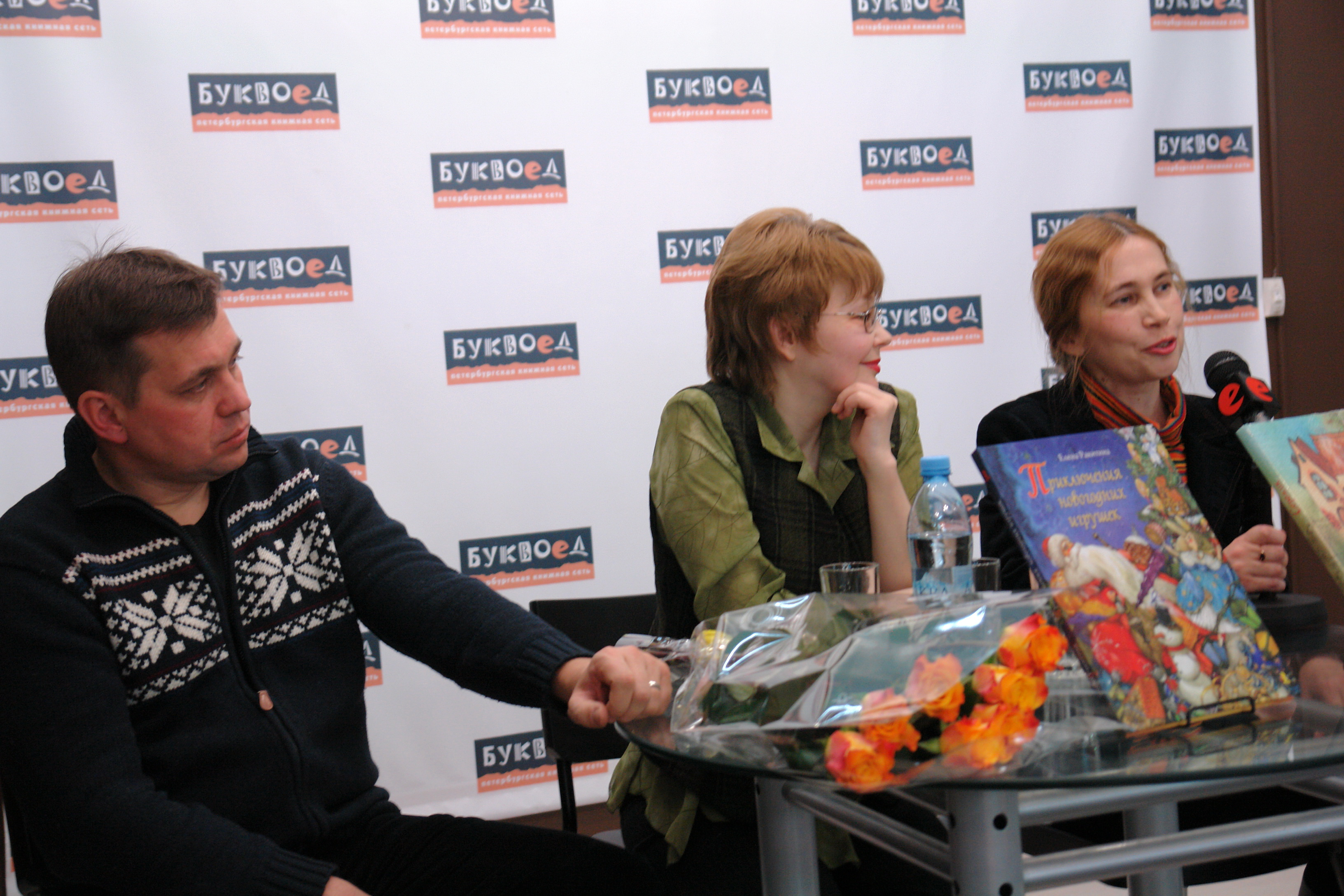 Елена Ракитина